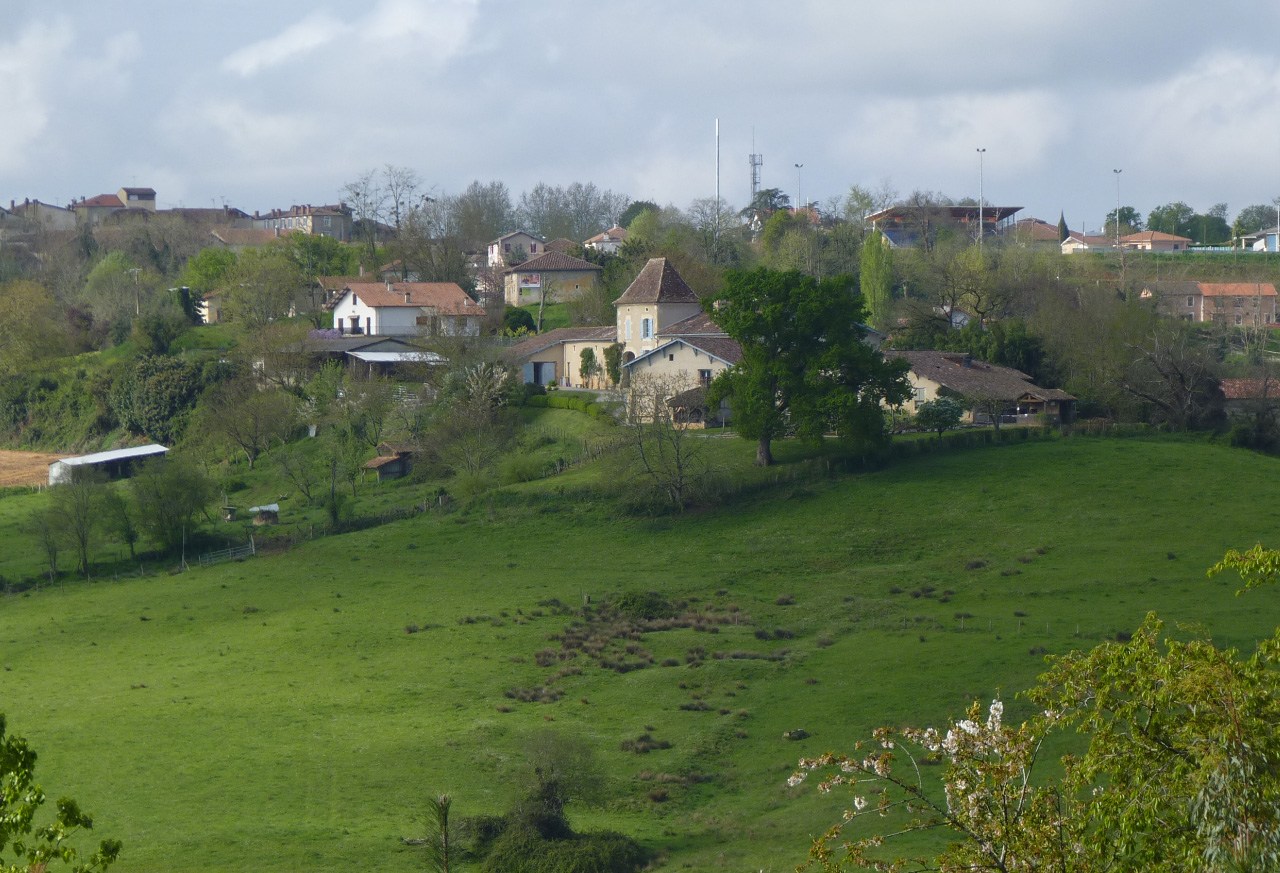 Musée de la Chalosse - Domaine Carcher - Montfort-en-Chalosse